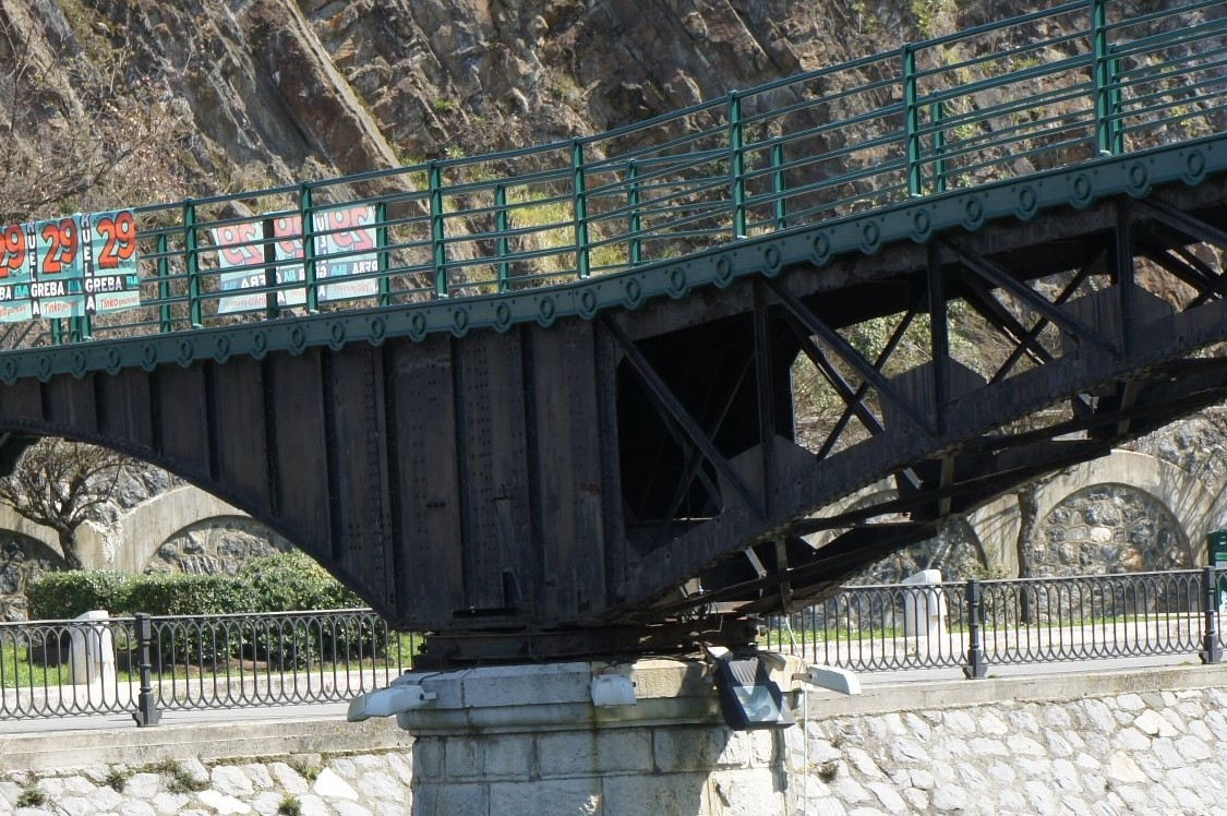 Pasarela de Alfonso XIII